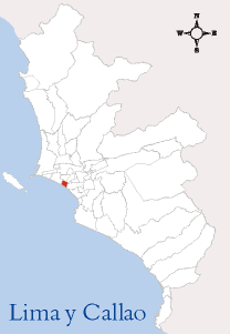 Localización del Distrito de Magdalena del Mar Imagen elaborada por--Edgardo Reyes 21:45 9 mar, 2005 (CET) Categoría:Mapas del Perú (imagen)